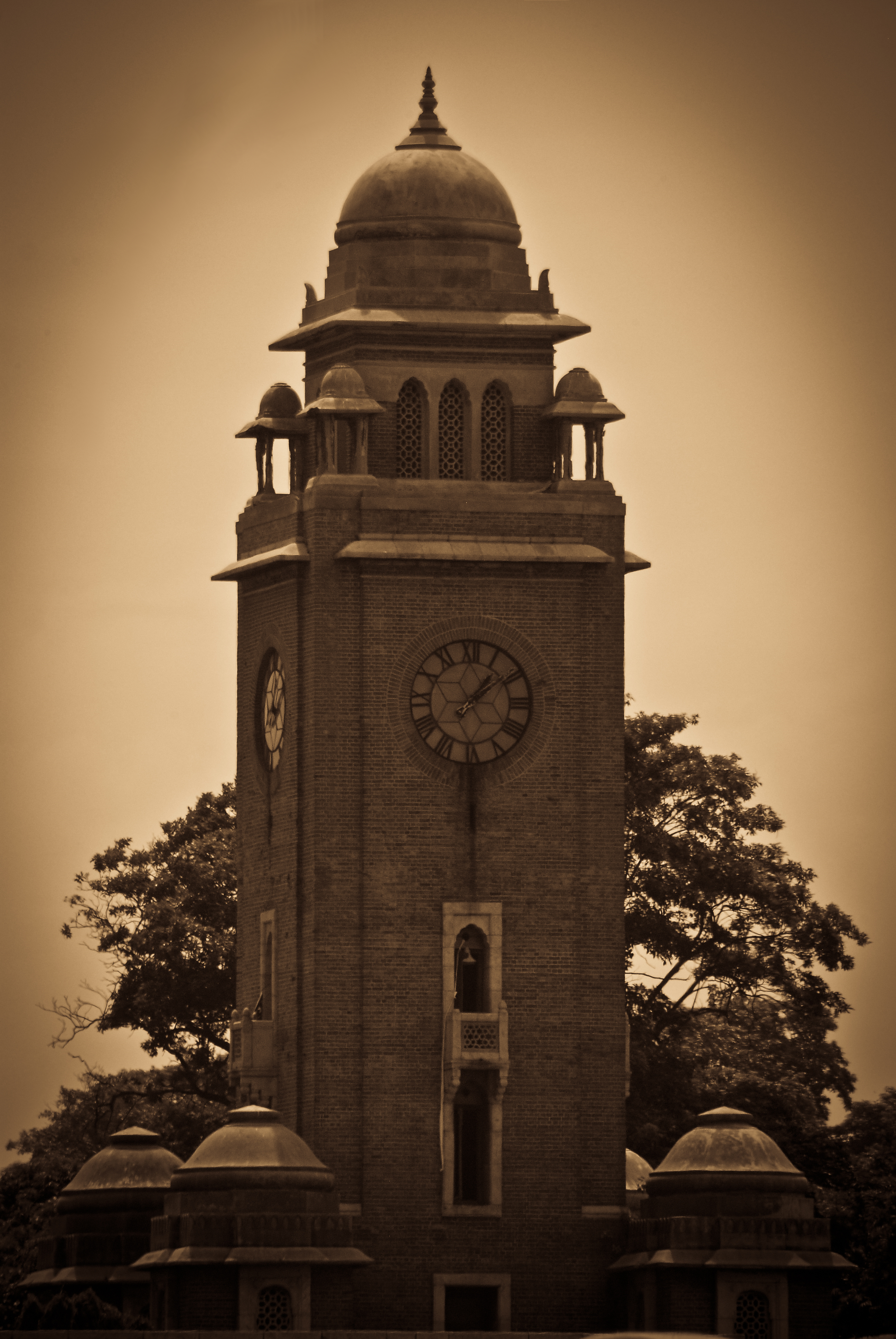 State Bank Of India